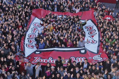 Lasarte-Orian euskara maratoia ekimenaren bukaeran ateratako familia argazkia